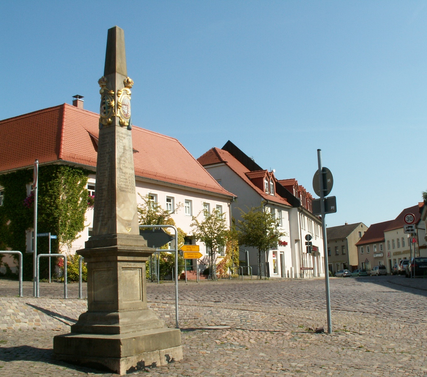 Distanzsäule Landsberg (Saalekreis), Nachbildung